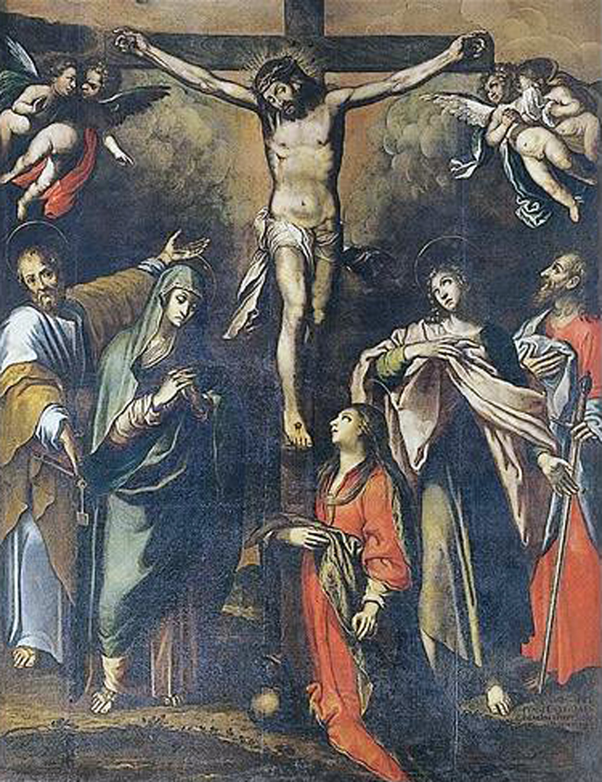 Crucifixion